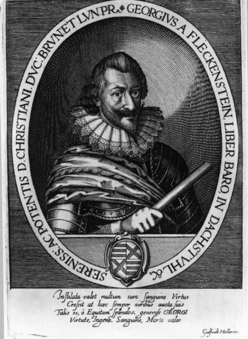 Georg_II_von_Fleckenstein-Dagstuhl, etching